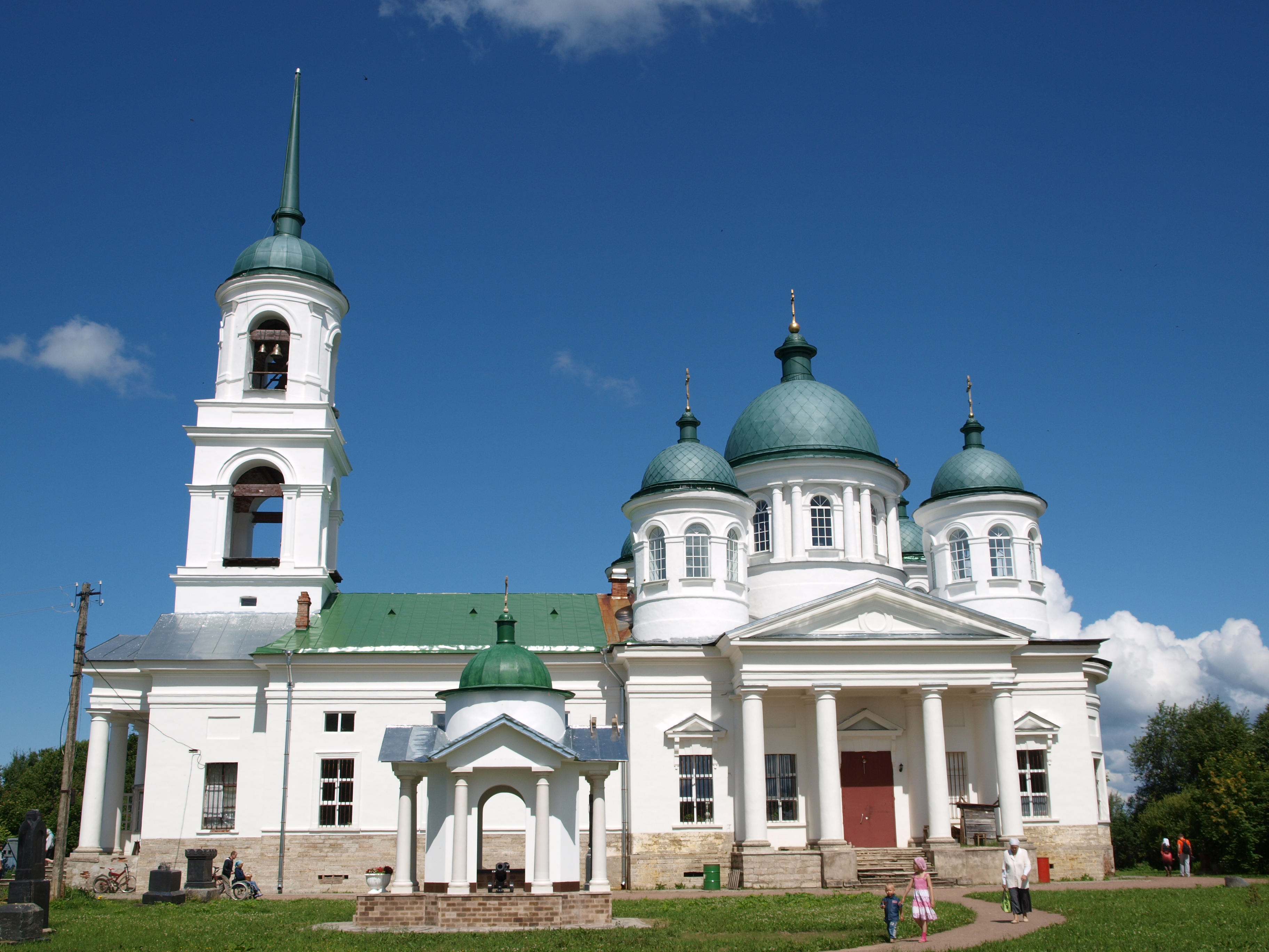 Церковь Рождества Христова: Надкопанье, Волховский район, Ленинградская область